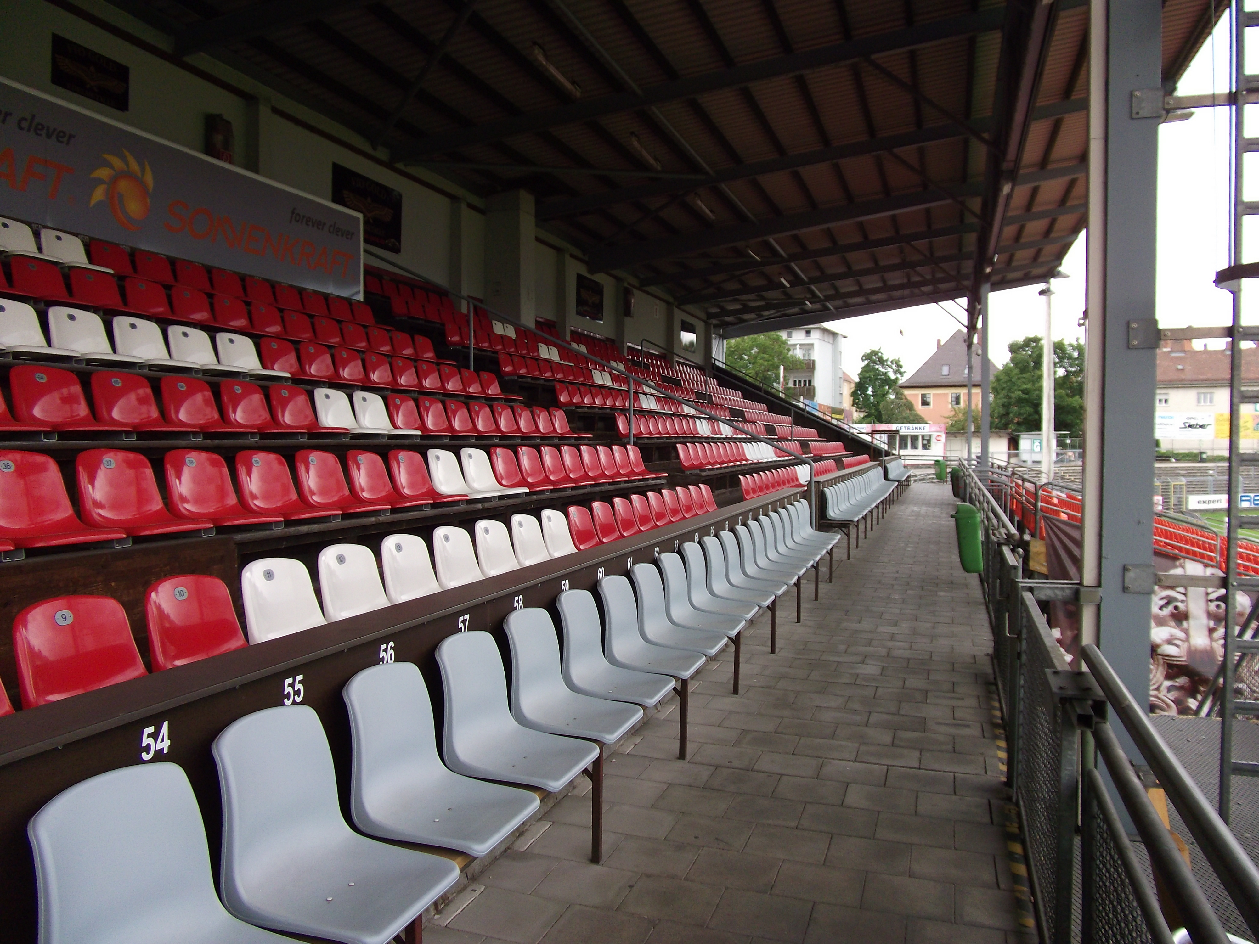 Haupttribüne des Regensburger Jahnstadions.